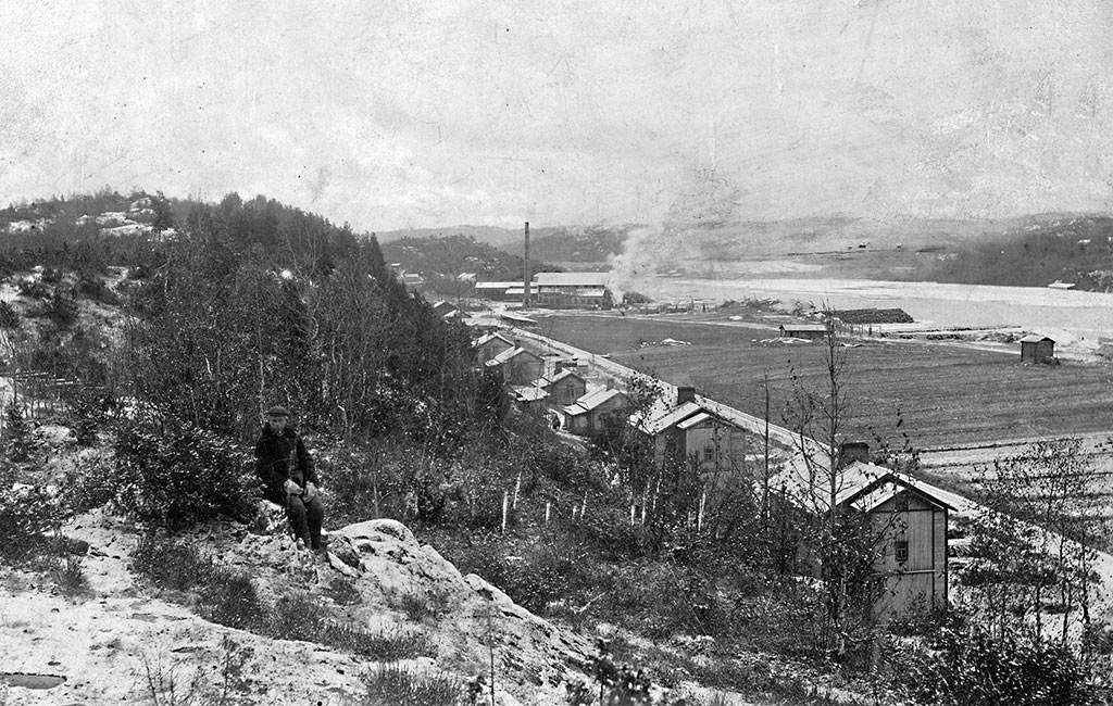 Вид на лесопилку Пеконлахти в Хийтола в начале 1900-х годов. На переднем плане ряд жилых домов работников лесопилки.